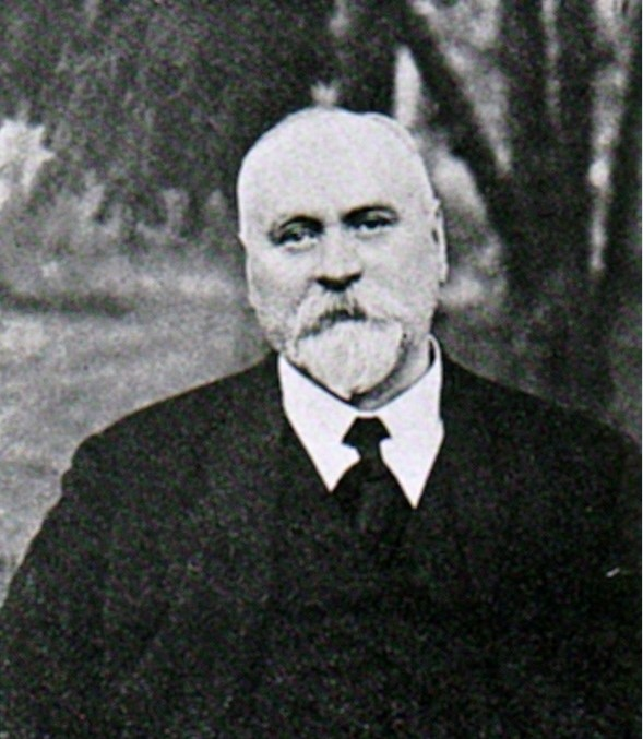 Photograph of Constantin Sandu-Aldea